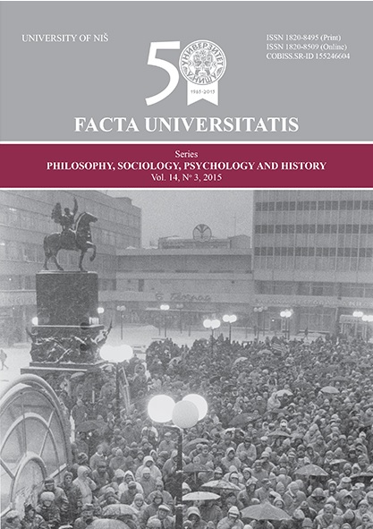 Korica časopisa „Facta Universitatis. Series: Philosophy, Sociology, Psychology and History“